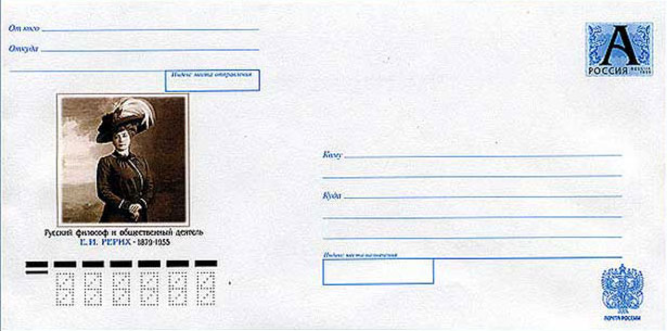 Маркированный конверт России, посвященный 125-летию Елены Ивановны Рерих. На иллюстрации – фотопортрет Е. И Рерих и надпись: «Русский философ и общественный деятель Е. И. Рерих. 1879-1955».